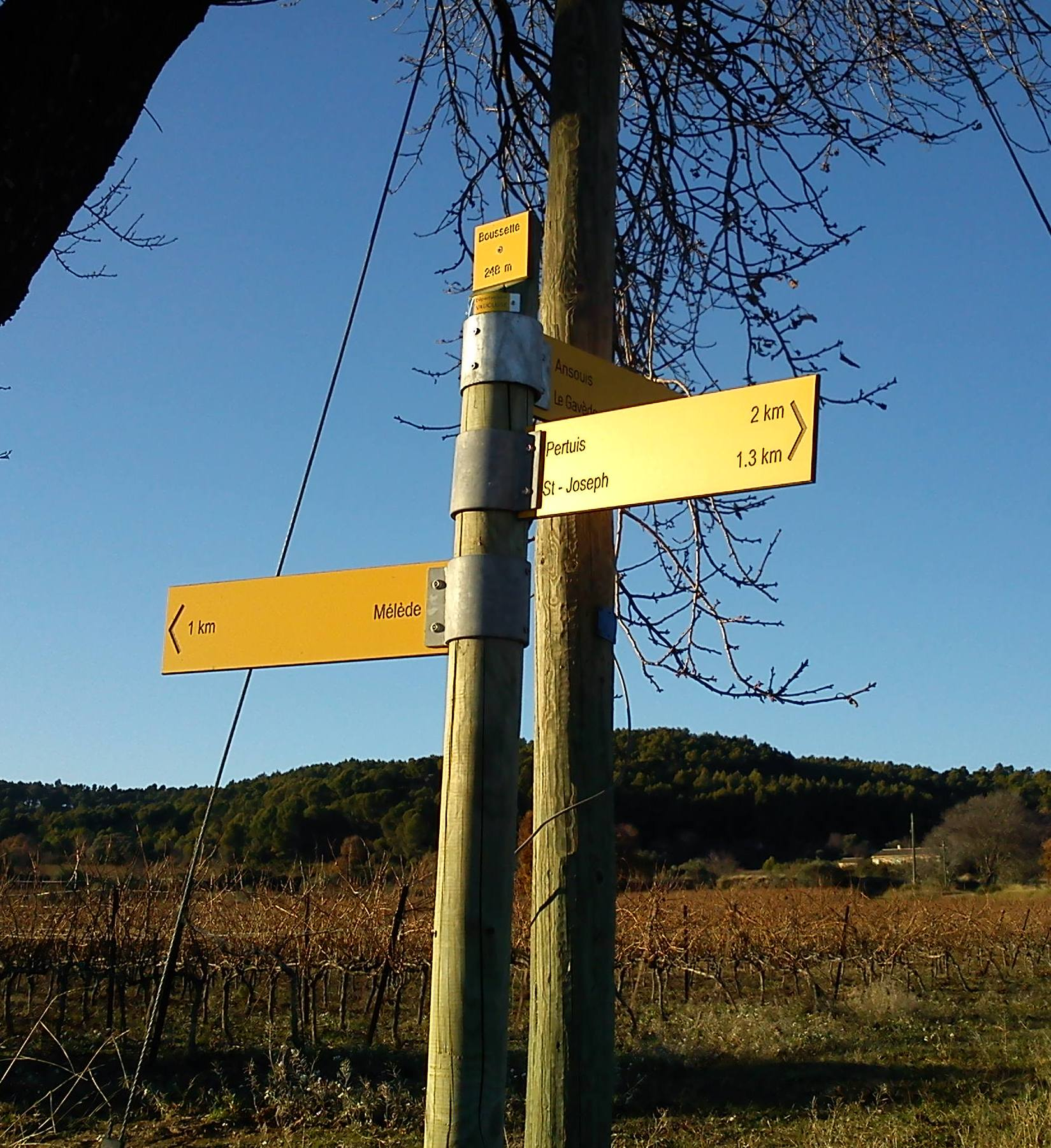 Indication sentier pedestres Pertuis